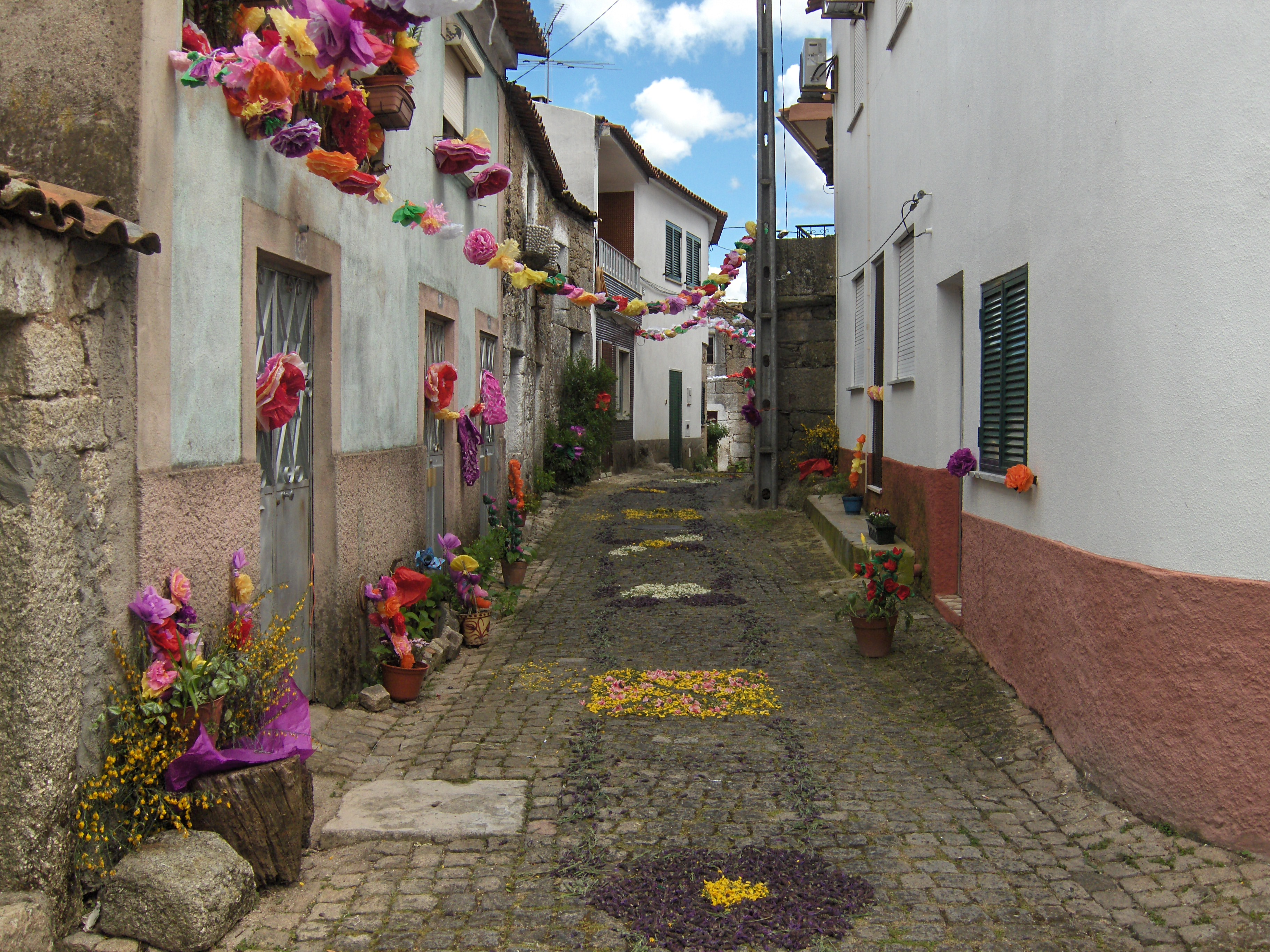 Aspecto de rua de Aldeia de Santa Margarida, durante o I Festival das Flores, que se realizou no fim-de-semana de 1 e 2 de Maio de 2010. Um dos principais objectivos desta iniciativa é enfeitar as ruas da freguesia aproveitando as flores naturais existentes, assim como todo o tipo de flores artificiais e verduras. A concepção das flores, bem como a ornamentação das ruas e fachadas das habitações fica a cargo da população desta freguesia.